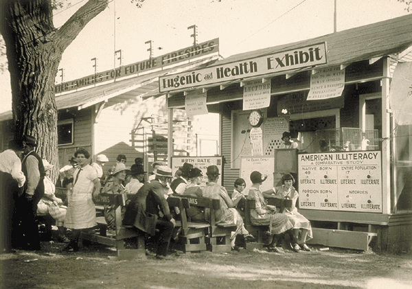 Exposição eugênica, EUA.